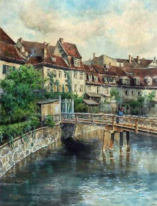 Das Naundörfchen in Leipzig mit der Hanreybrücke über den Pleißemühlgraben